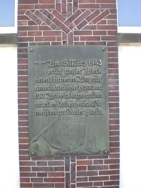 Erinnerungstafel auf dem Gelände der Lürssen-Werft, ehem. Bremer Vulkan